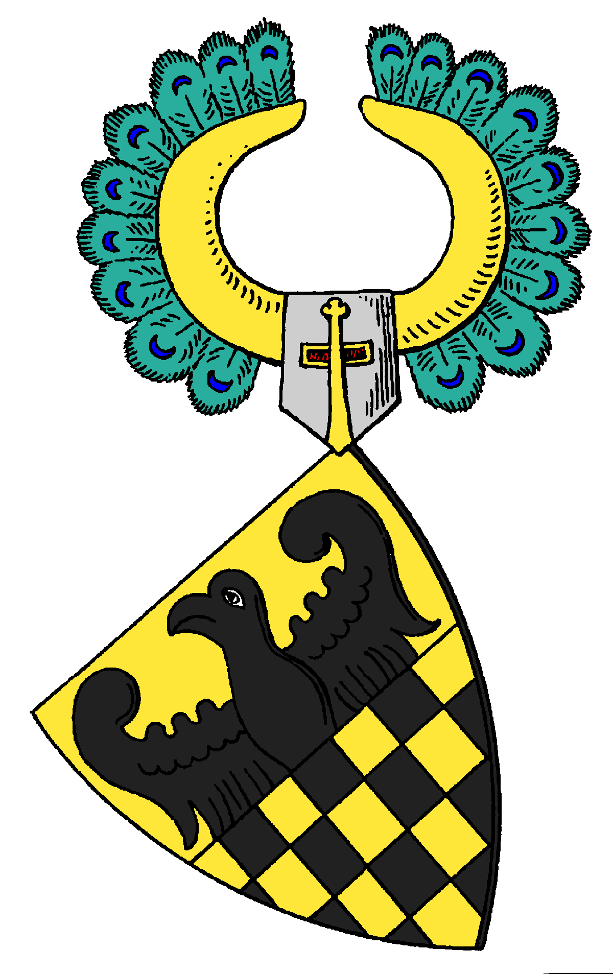 Stammwappen der von Putbus nach einem Siegel des Ritters Johannes von Putbus von 1337 mit dem alten Helmschmuck